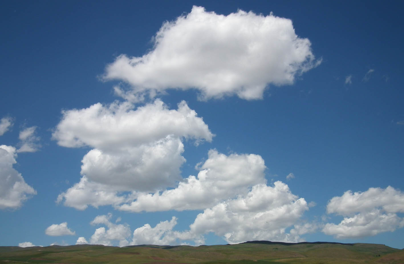 جاده اسالم خلخال